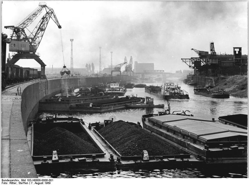 Magdeburg, Binnenhafen, Trennungsdamm, Lastkähne Zentralbild Ritter 7.8.1969 Magdeburg: Niedrigwasser im Binnenhafen: Mit großer Einsatzbereitschaft begannen die Transportarbeiter des bedeutendsten Binnenhafens der DDR den Schwierigkeiten des trockenen Sommers. Allein am Trennungsdamm (Foto), dem wichtigsten Umschlagspunkt des Hafens, müssen sie zur Zeit etwa 250 Tonnen Stückgut und 1500 Tonnen Schüttgut zusätzlich bewegen, um die Binnenschiffe zu leichtern und ihnen trotz Niedrigwasser die Weiterfahrt zu ermöglichen.